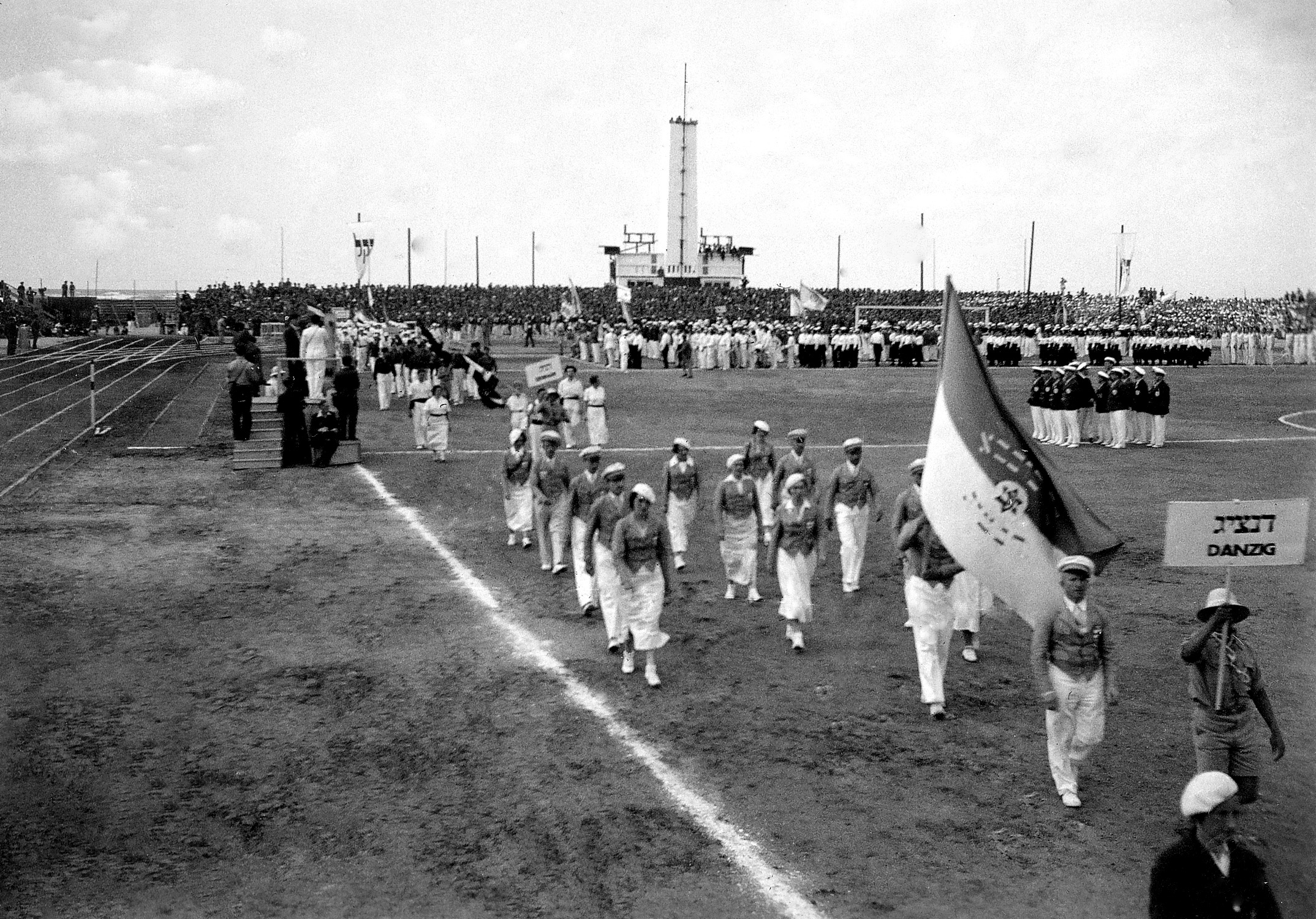 אוסף דוד עופר - המכביה השניה ; פריט מספר 24